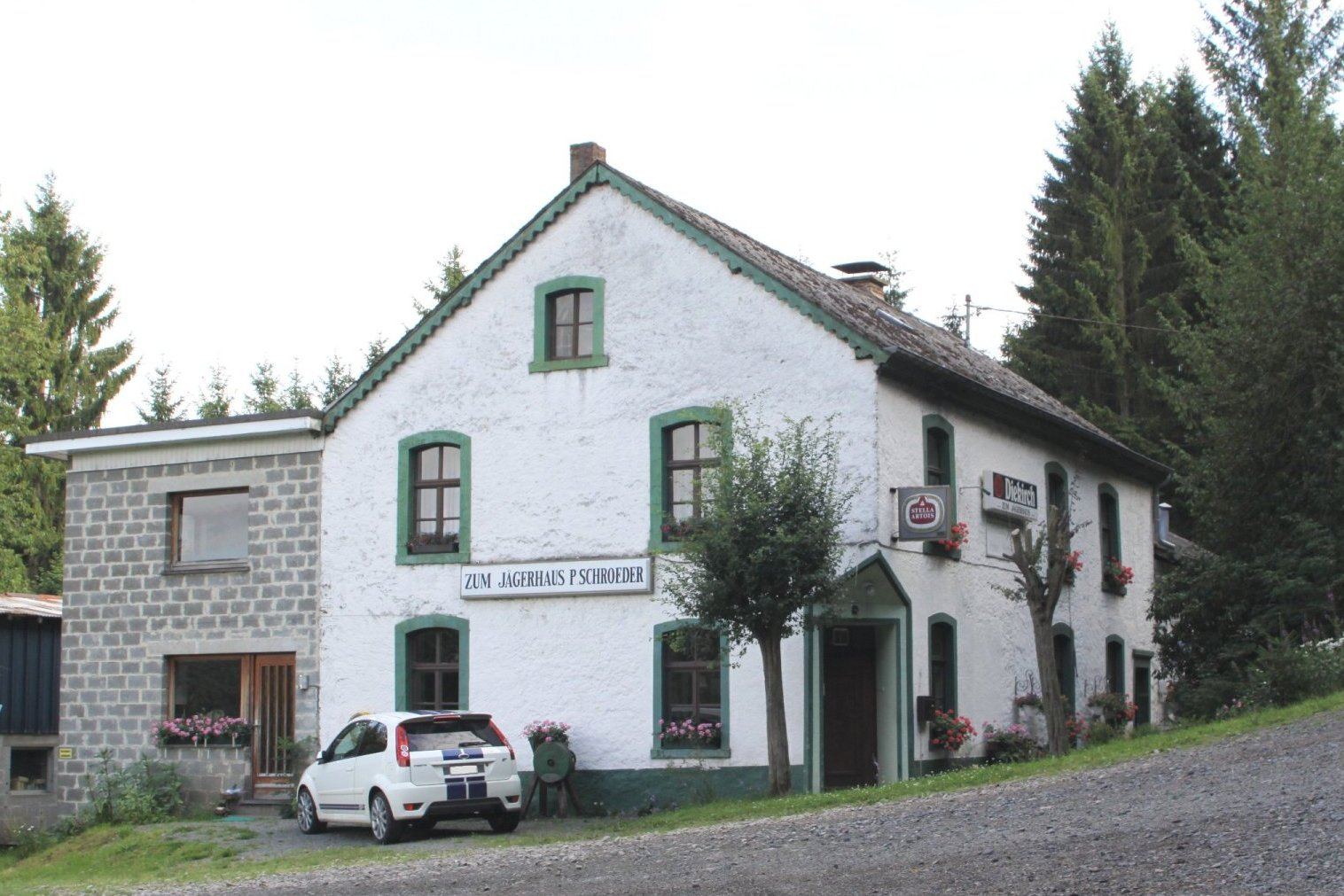 Diepert am August 2010.